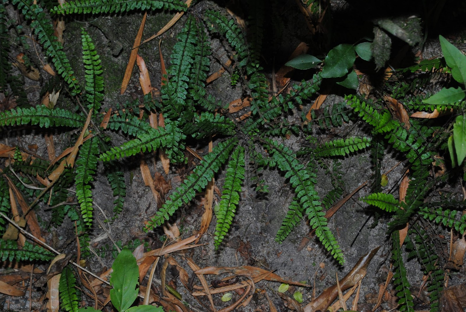 Asplenium ulbrichtii. Aspleniaceae. Fotos tomadas bajo bosque ribereño al margen del Río Negro cerca de Palmar, departamento de Río Negro y al margen del Arroyo Vera en el departamento de Soriano, Uruguay.